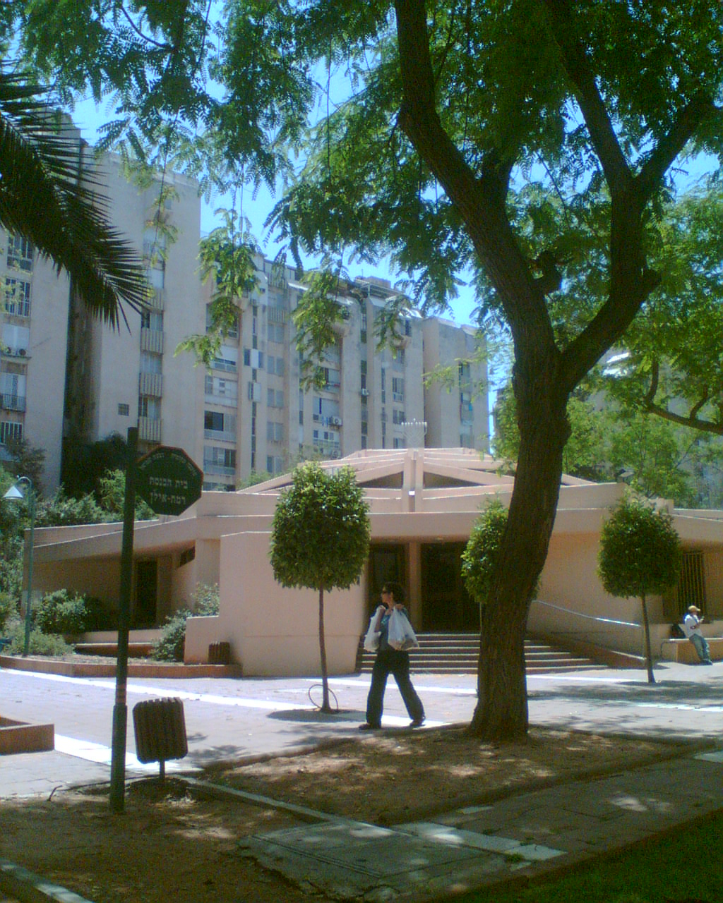 מבנה he:בית כנסת בשכונת רמת אילן שבדרום he:גבעת שמואל בתכנון he:אדריכל צבי לישר מראשית he:שנות ה-80 המתאפיין בסגנון הברוטאליסטי (כיום צבוע לבן). 5/2007 צילום: מיכאלי 23:24, 26 במאי 2007 (IDT)